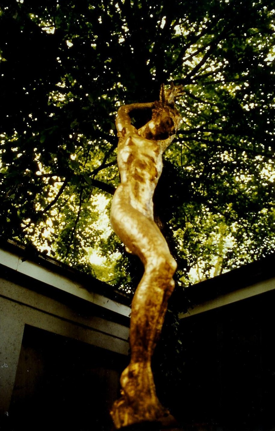 Daphne-Figur von Renée Sintenis / Daphne from Renée Sintenis